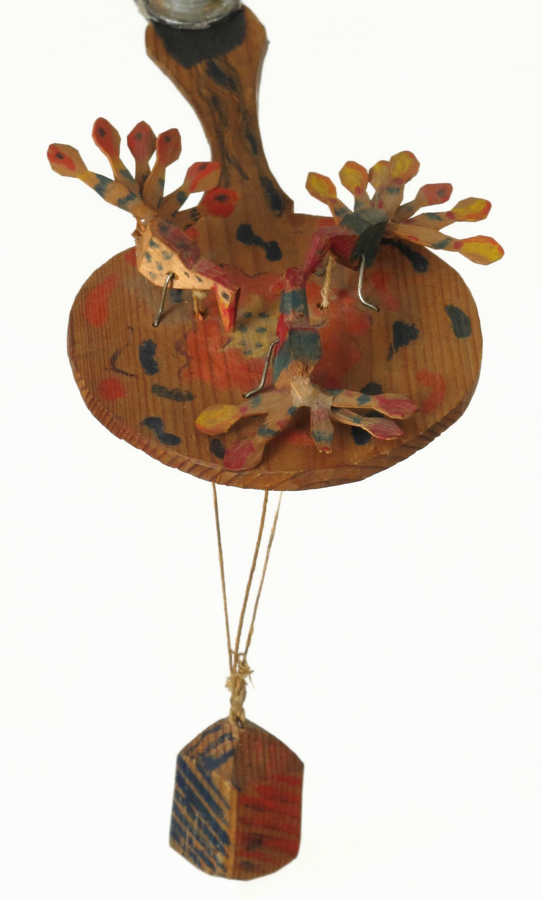 Hakkebrett, russisk krigsfangearbeid Aust-Agder museum og arkiv Kuben Arendal